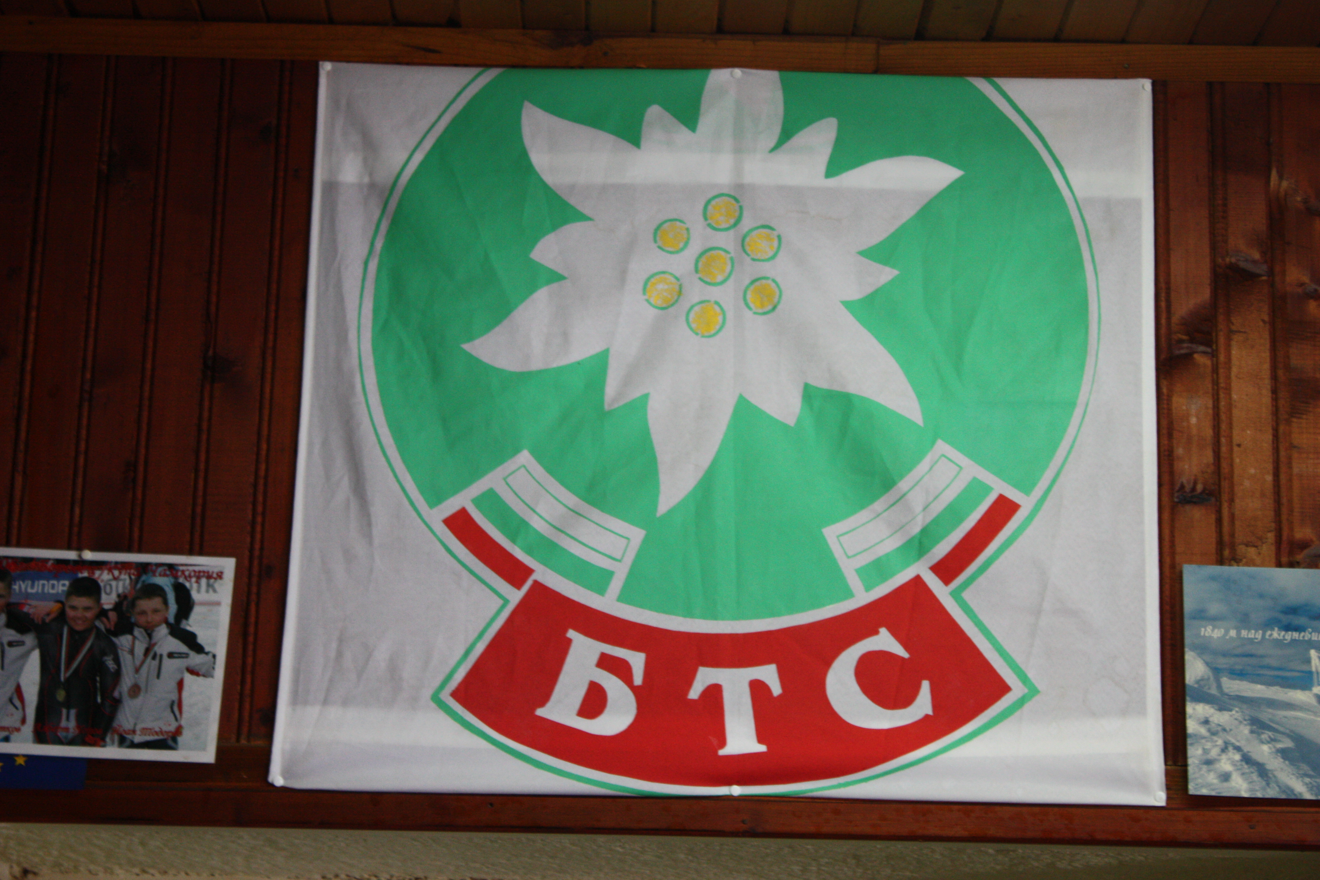 Vitosha mountain Aleko, Sofia, Bulgaria, Witoschagebirge, Витоша